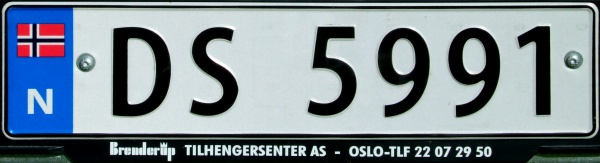 Standard skilt for tilhenger.